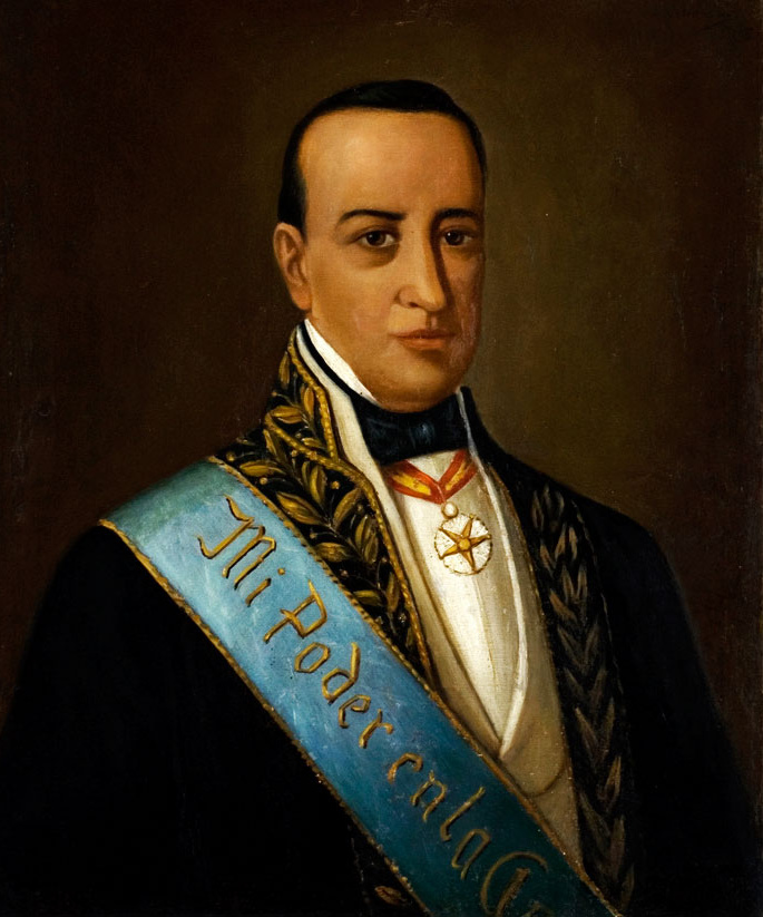 Vicente Ramón Roca Rodríguez (2 September 1792 – 23 February 1858)